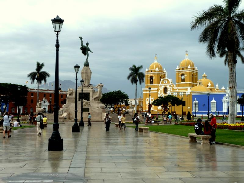 Plaza de Armas — Trujillo, Perú.